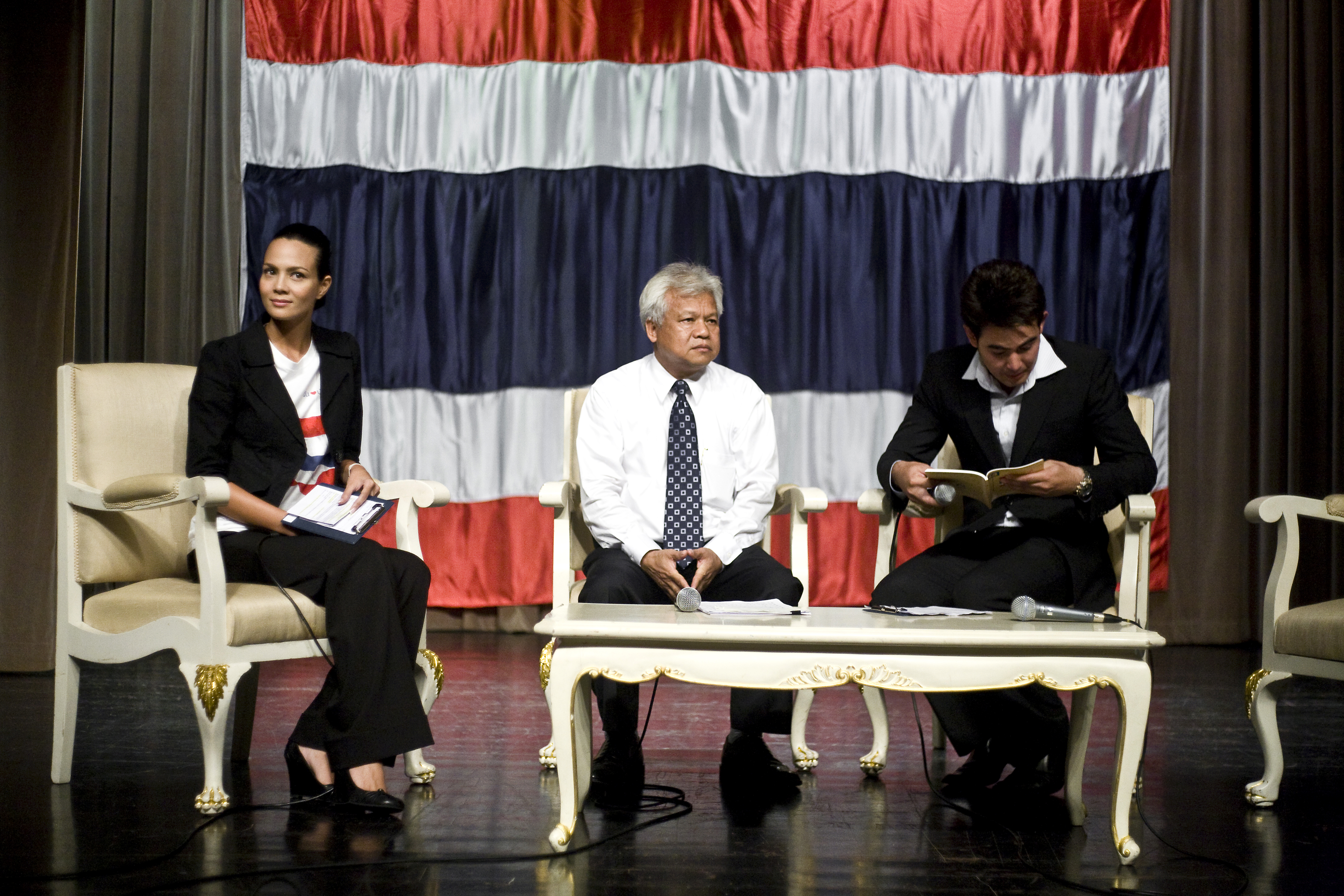 พิธีกร(ซอนย่า คูลลิ่ง และนิธิ สมุทรโคจร) พูดคุยและซักถามเรื่องราวเกี่ยวกับประวัติศาสตร์ของเพลงชาติไทย นายกรัฐมนตรี เป็นประธานเปิดโครงการและขอความร่วมมือหน่วยงานภาครัฐและเอกชนในการดำเนิน โครงการ "ไทยสามัคคี ไทยเข้มแข็ง" ระหว่างหน้าตึกสันติไมตรี และตึกไทยคู่ฟ้า ทำเนียบรัฐบาล 18กันยายน2552 (The Official Site of The Prime Minister of Thailand Photo by พีรพัฒน์ วิมลรังครัตน์)